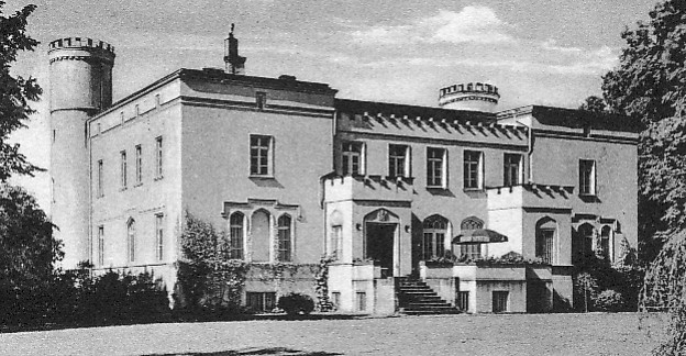 Schloss Jackschönau, Gartenseite (1928)